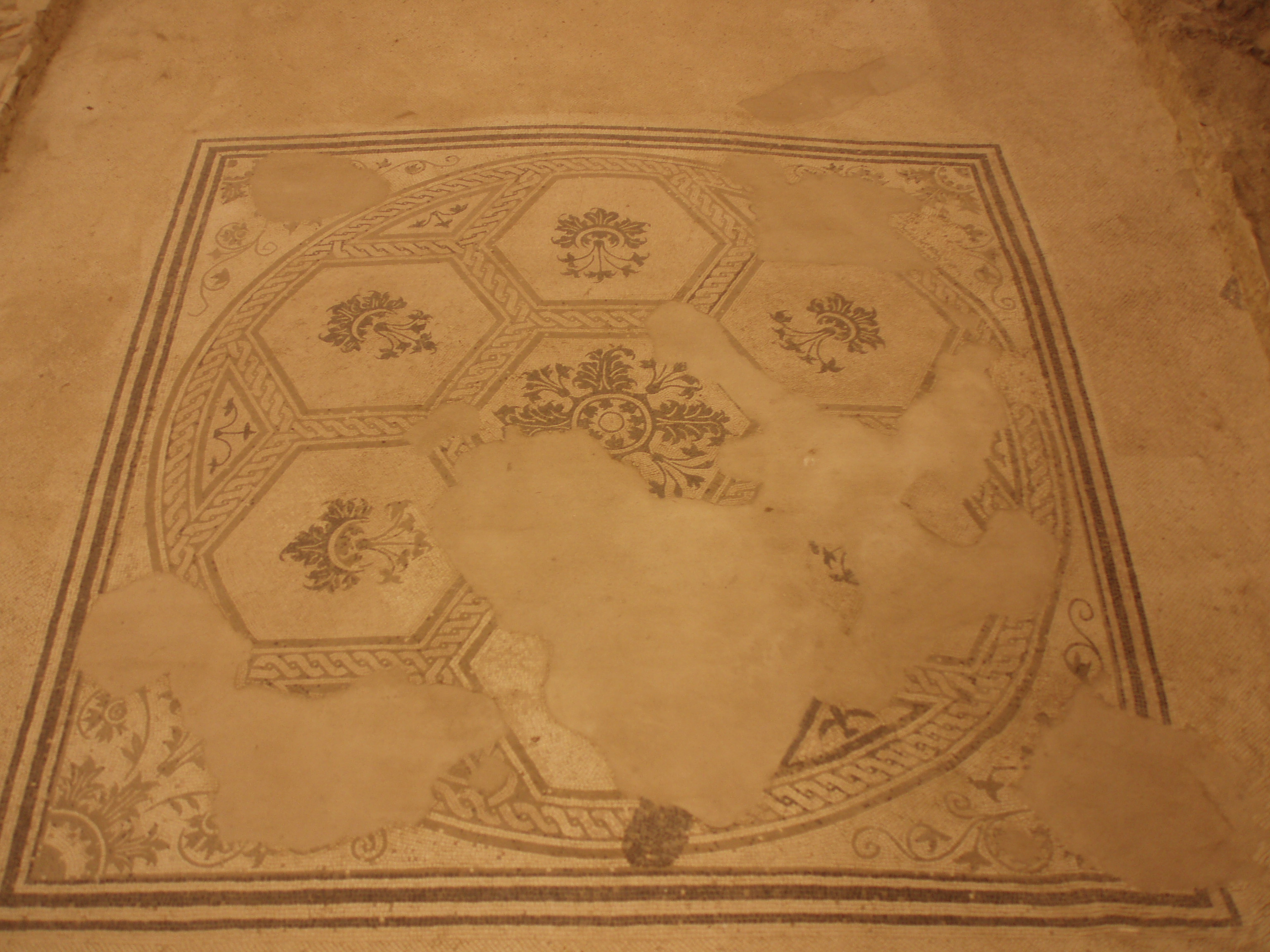 Suasa, Domus dei Coiedii - 02 - Mosaico dell'Acanto.JPG